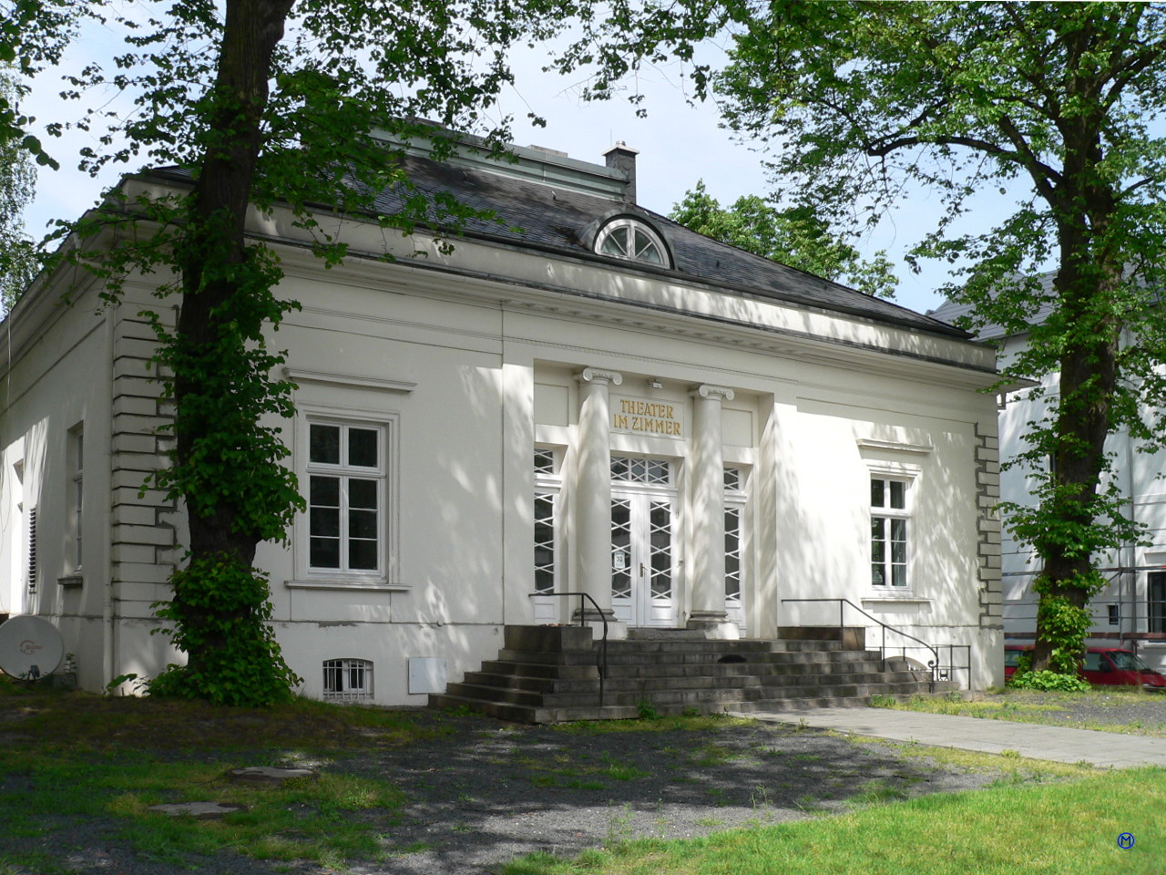 Theater im Zimmer, Hamburg, Alsterchaussee 30 This is a photograph of an architectural monument.